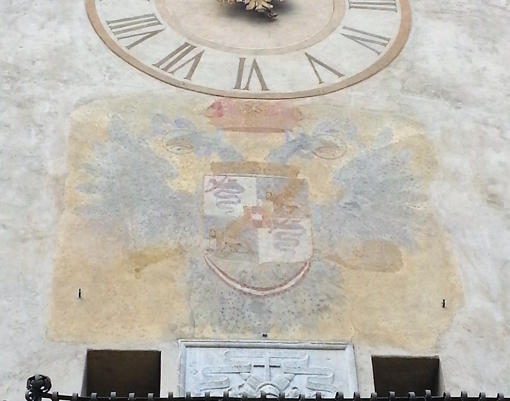 Stemma dei Visconti e della repubblica veneta